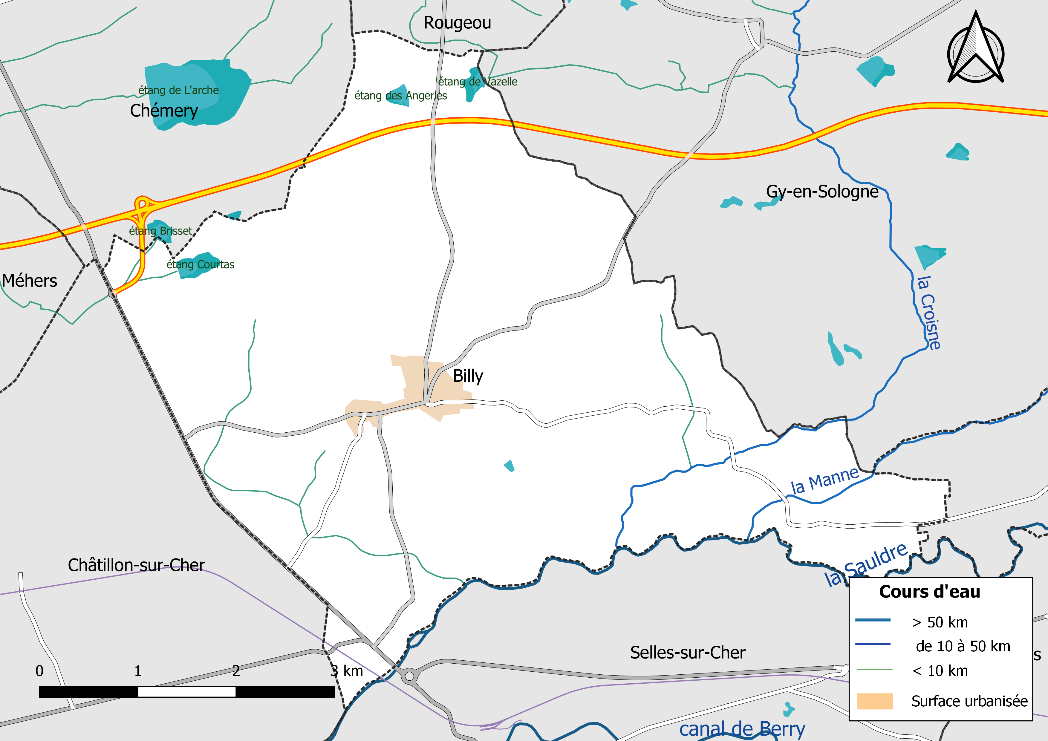 Carte du réseau hydrographique de la commune de Billy (France).